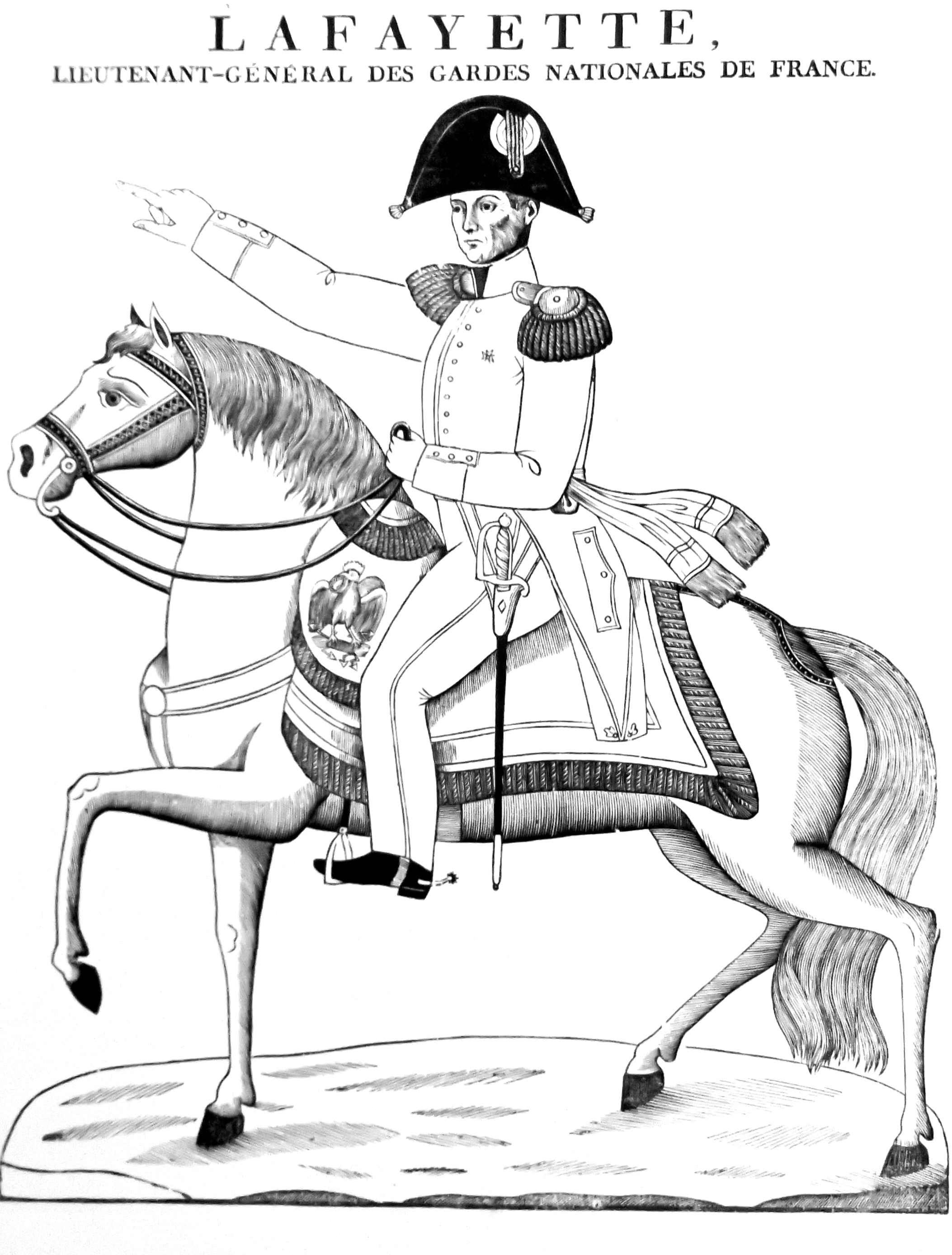 Lafayette, lieutenant-général des Gardes nationales de France - Desfeuilles - Gravure - 1830